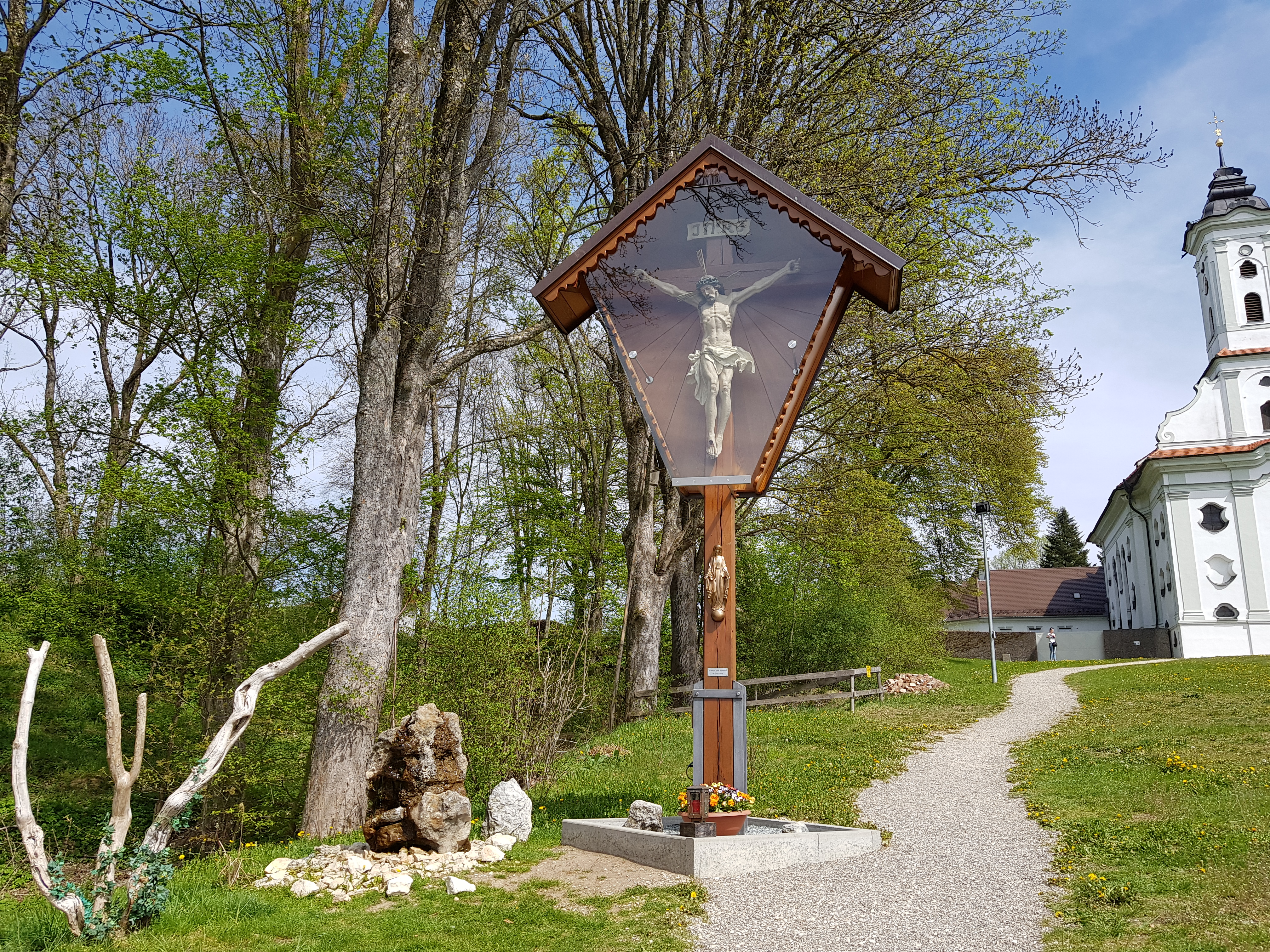 Kreuz vor dem Kloster in Welden, Landkreis Augsburg